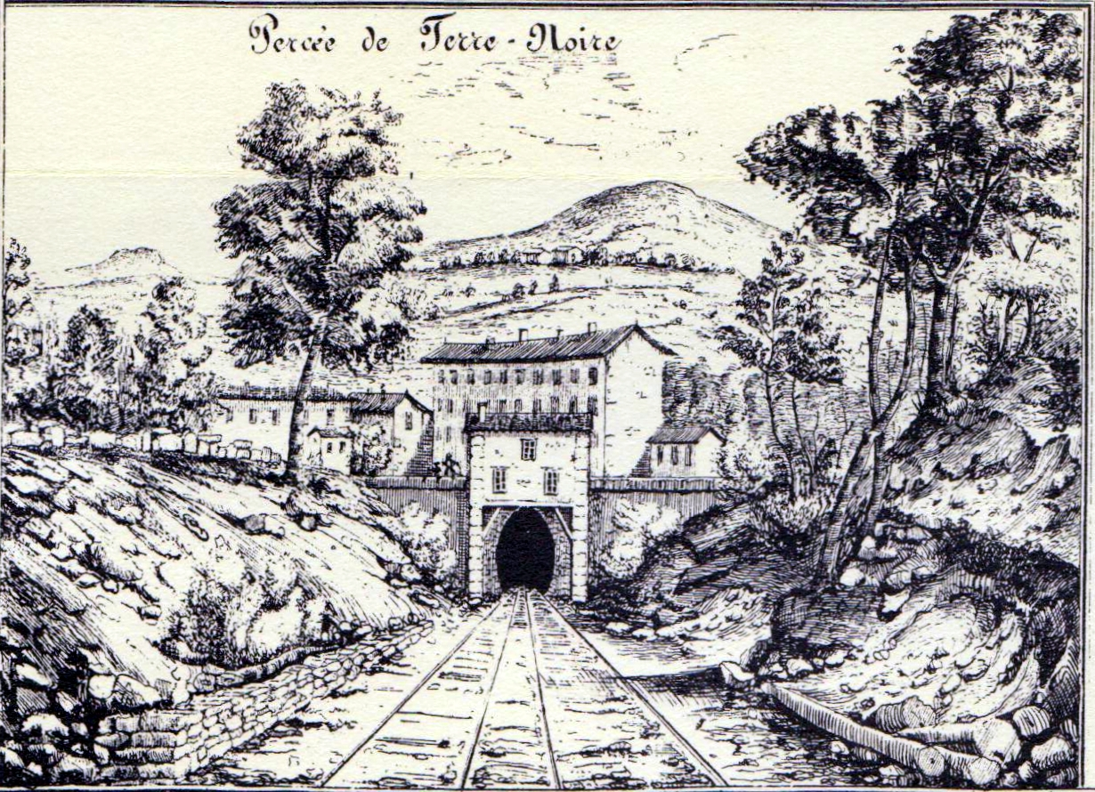 dessin